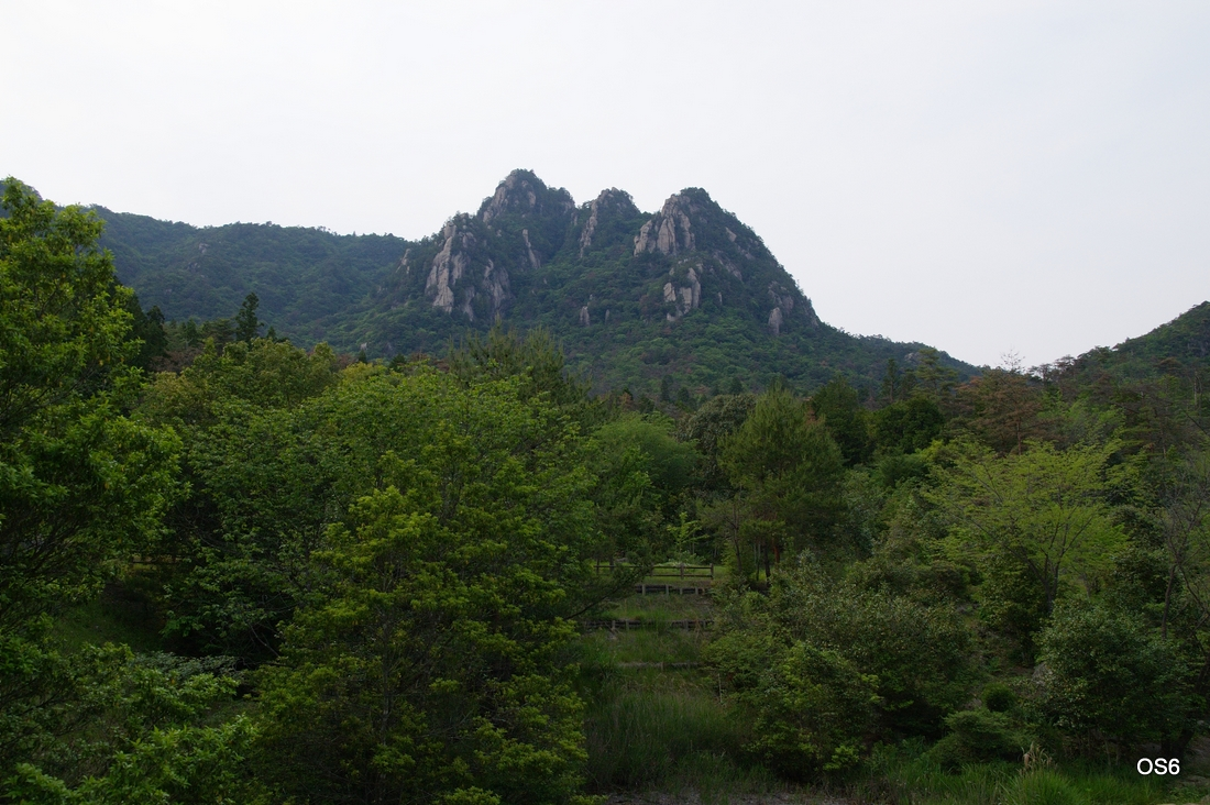 三倉岳 Mikuradake